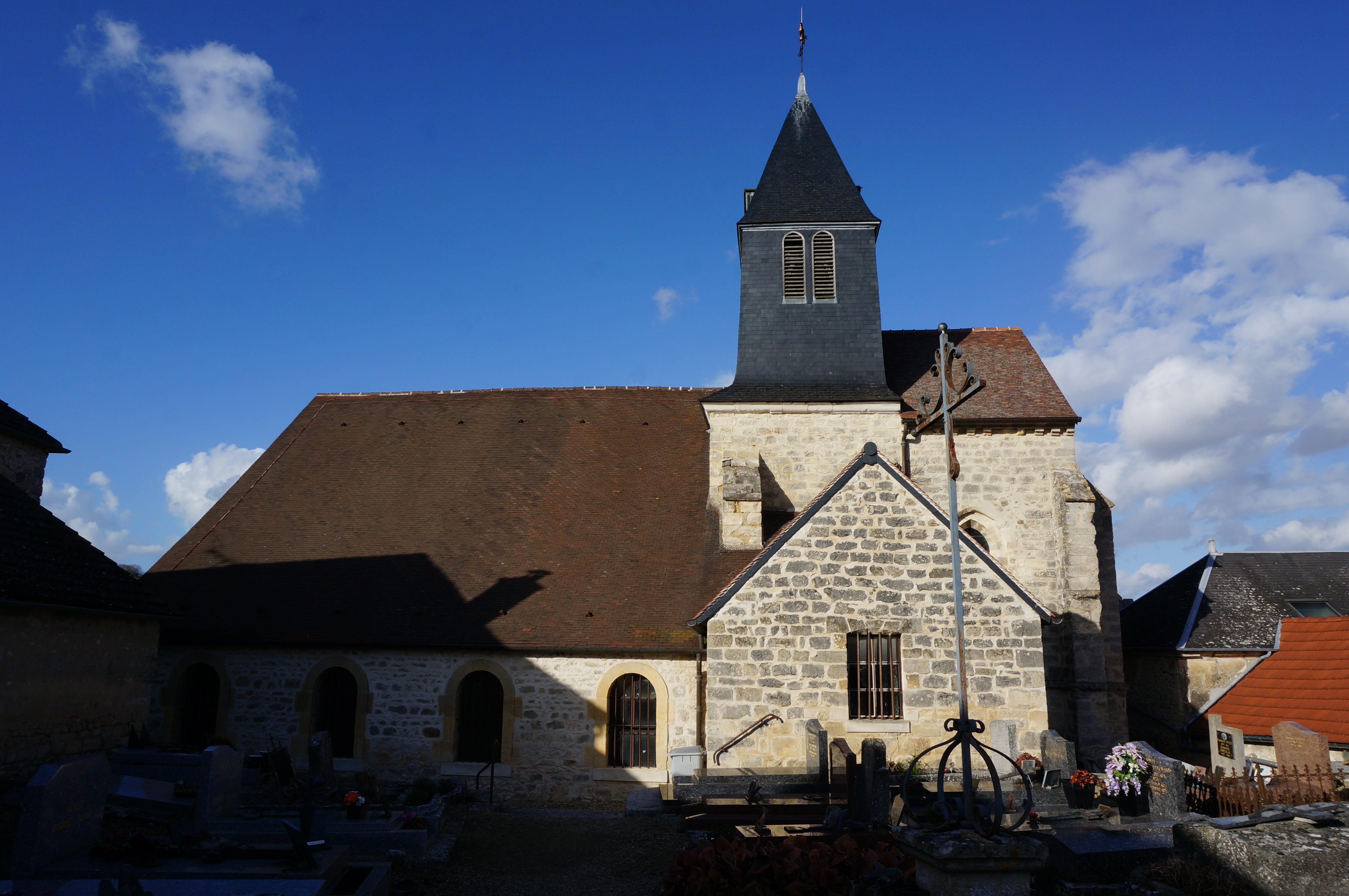 vue de Bouffignereux.